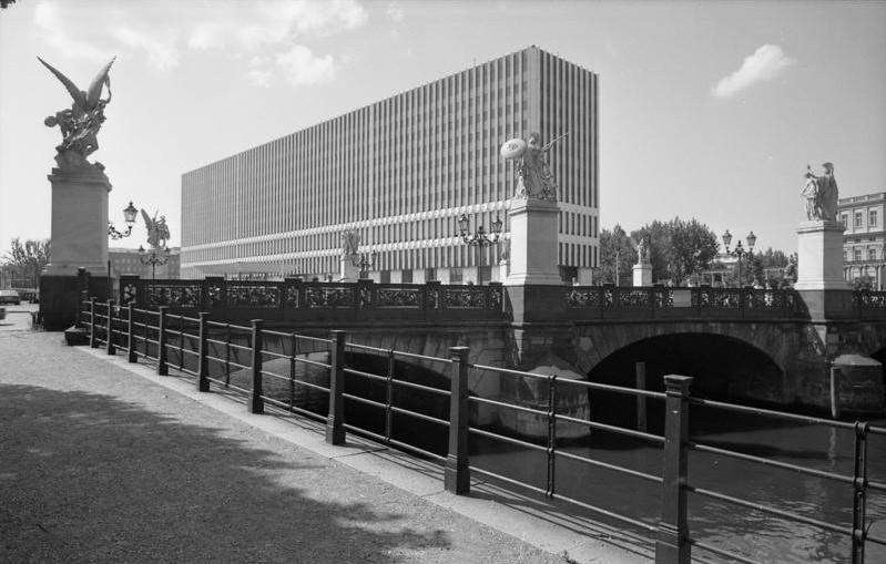 22.7.1991 Berlin-Mitte, Schloßbrücke mit ehemaligem DDR-Außenministerium